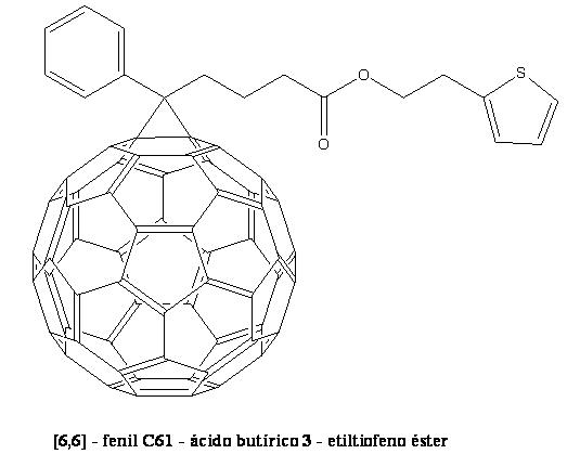 fig 3